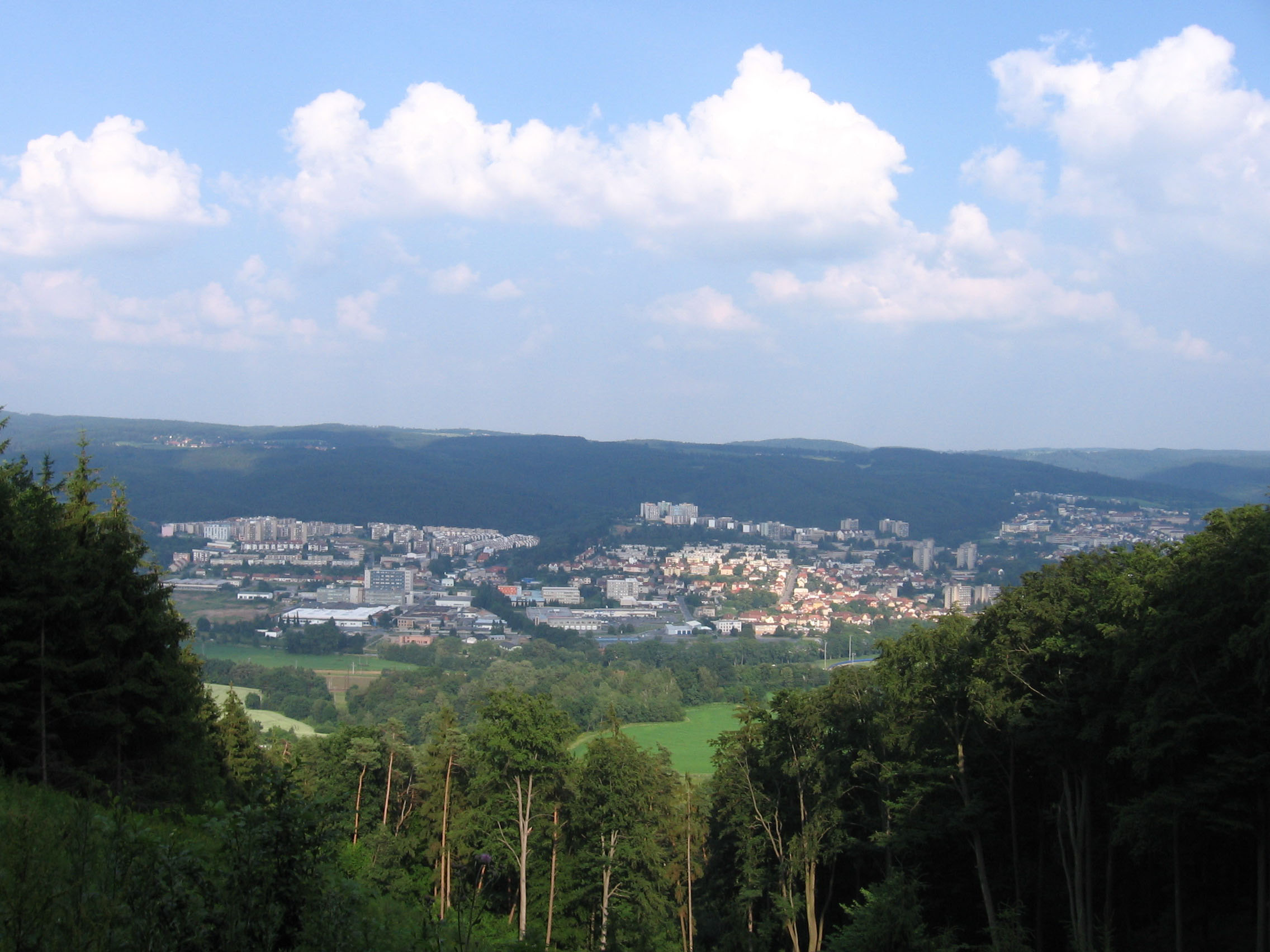 Northern part of Blansko, Czech Republic.